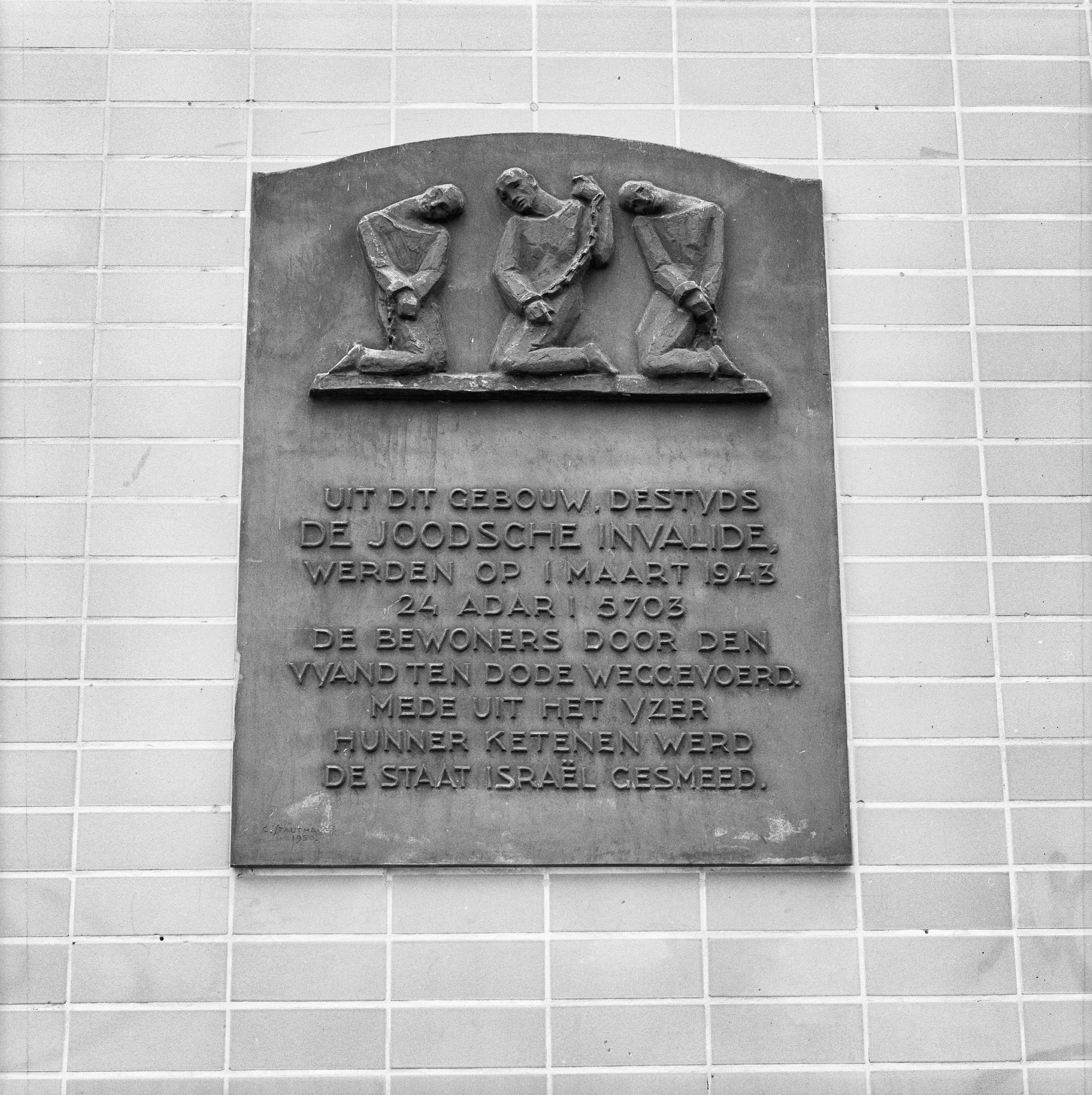 Joodsche Invalide: Herdenkingsplaat (plaquette) tegen de gevel van het gebouw de Joodsche Invalide